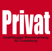 Logo der Privat-Medien